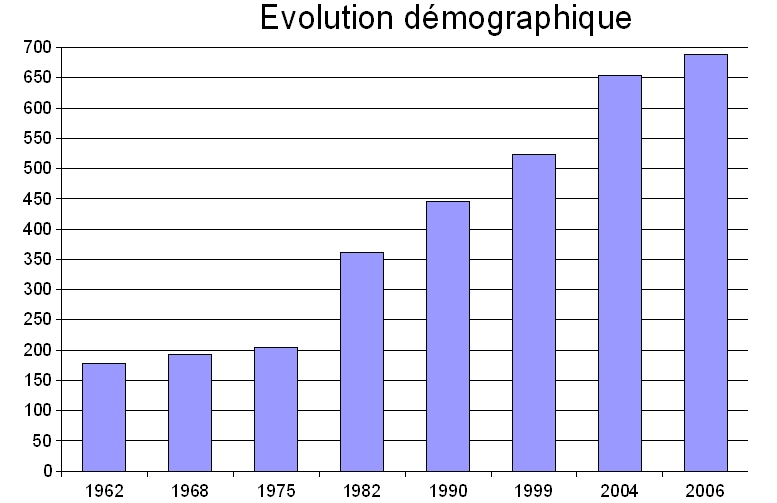 graphique démographie Saiguede